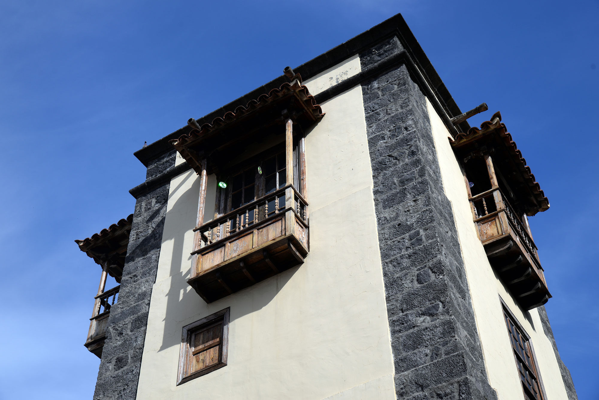 Blick von der Calle de Valois